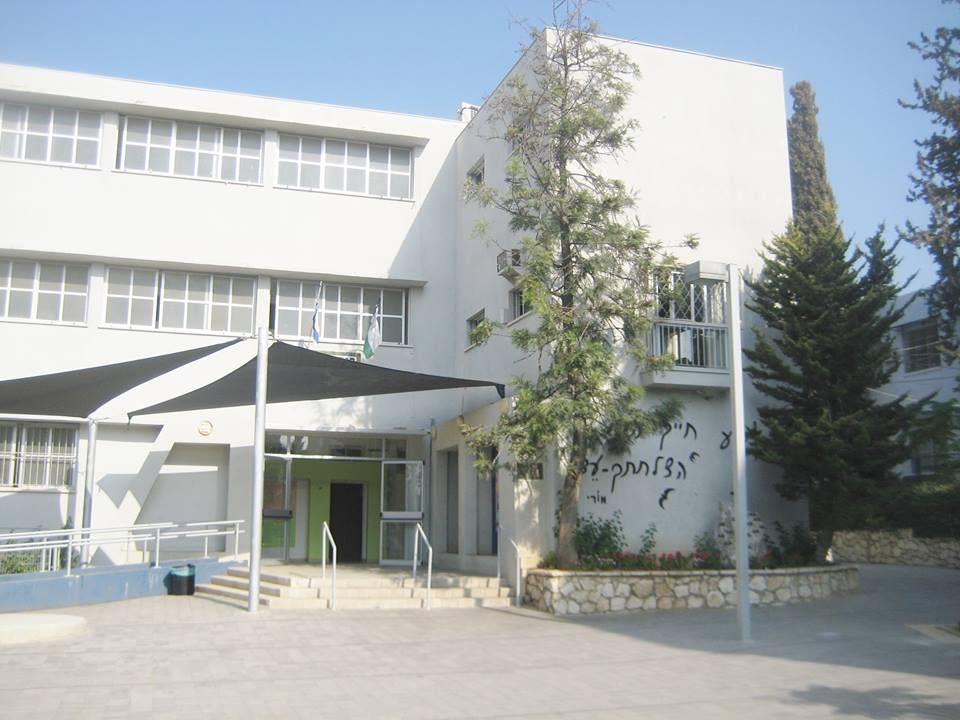 חזית בניין ההנהלה הנמצא מול הכניסה הראשית לבית הספר